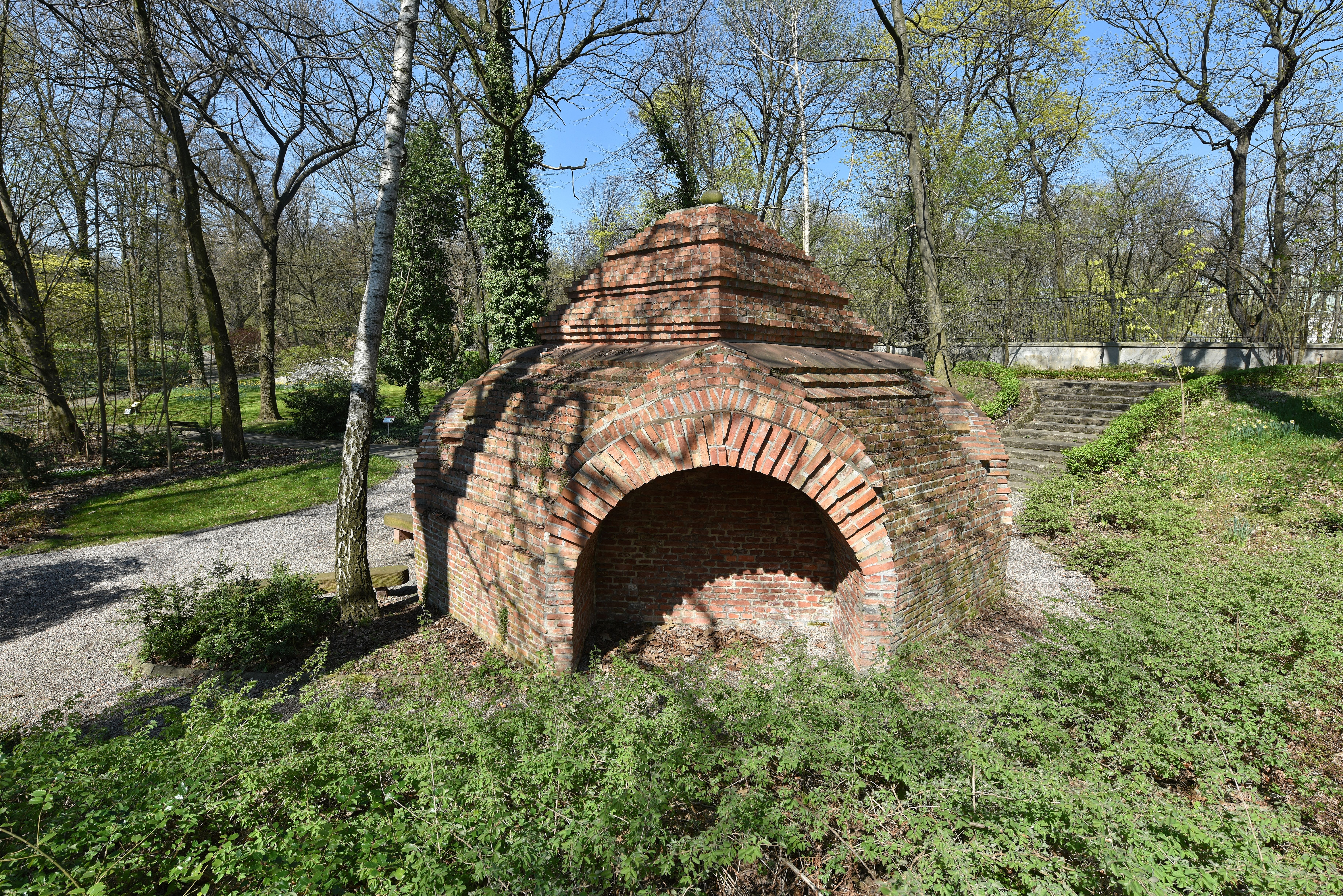 Upamiętnienie miejsca, w którym wmurowano kamień węgielny pod budowę Świątynię Opatrzności w Ogrodzie Botanicznym w Warszawie